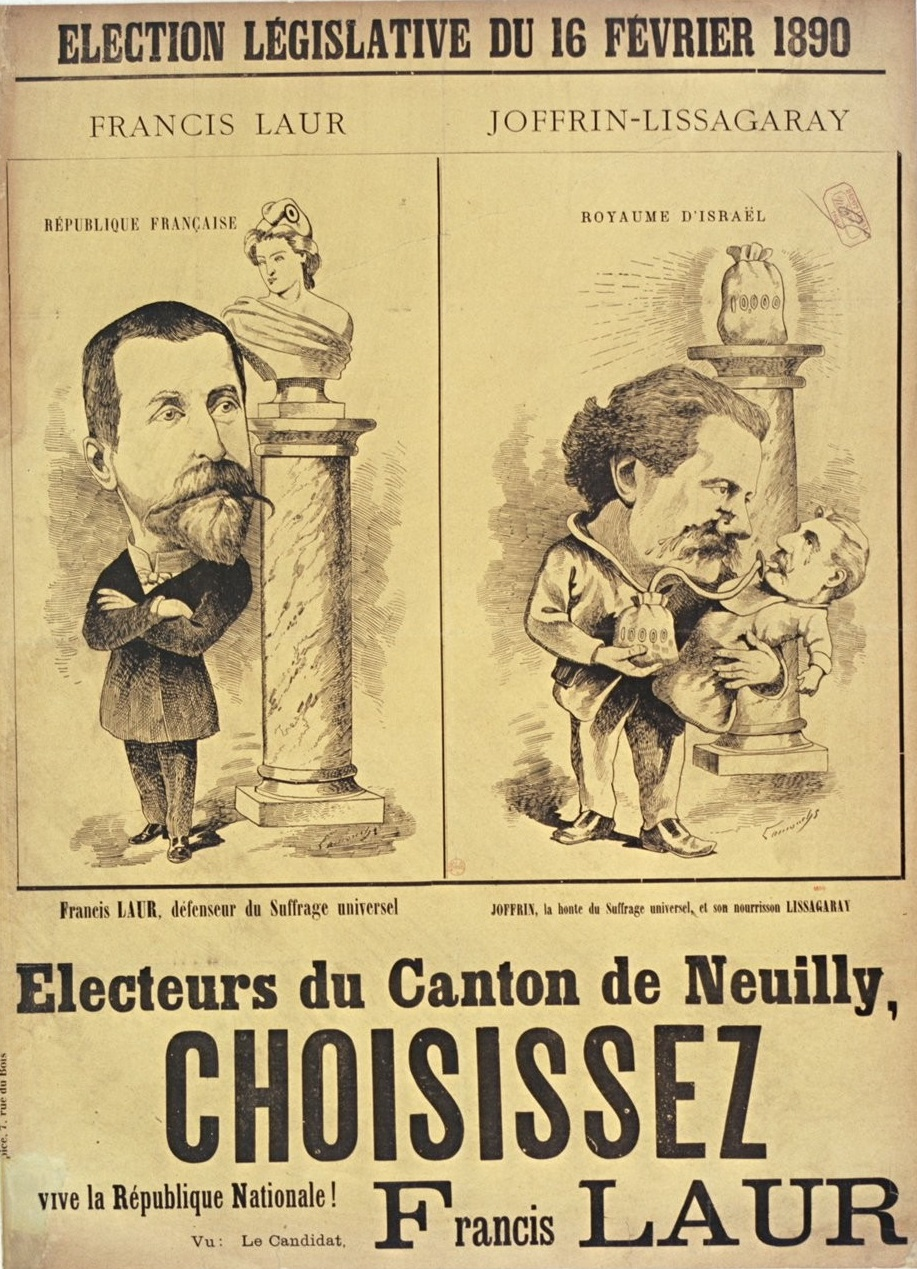 Affiche électorale dessinée par Oscar Lamouche pour les élections législatives 1890 opposant Francis Laur et Jules Joffrin